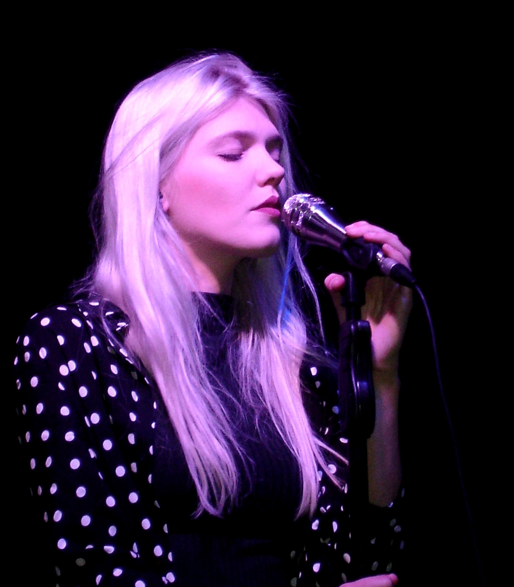 Polska piosenkarka Daria Zawiałow podczas koncertu w 2017 roku.